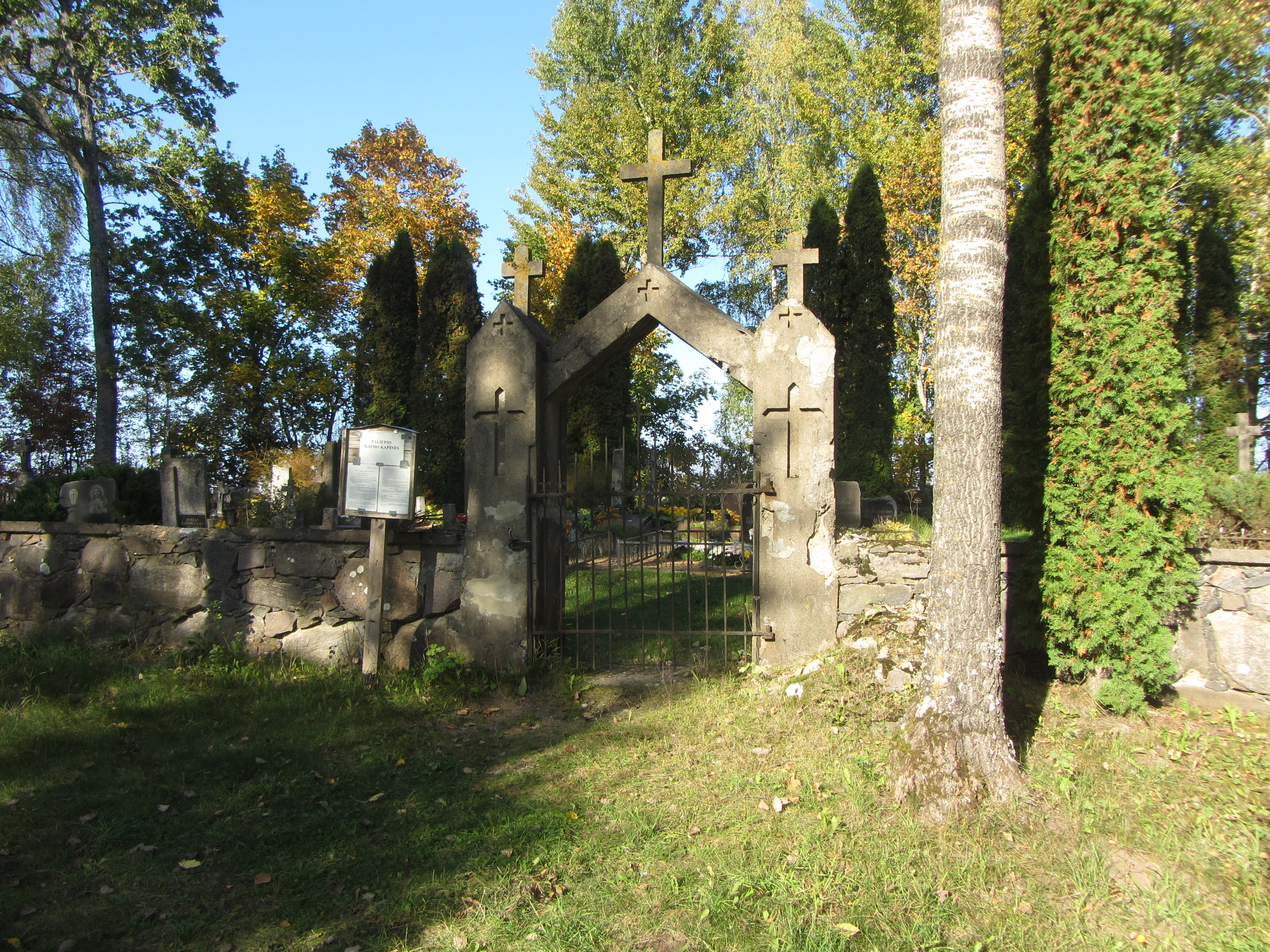 Kazliškio sen., Lithuania